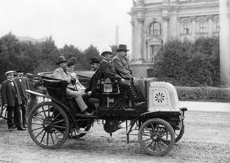 Zentralbild Erste Berliner im Betrieb befindliche Motordroschke des Fuhrwerksbesitzers Thien Die erste Berliner Autodroschke des Fuhrunternehmens Emil Thien auf dem Königsplatz. Aufn. um 1905 [Scherl Bilderdienst]